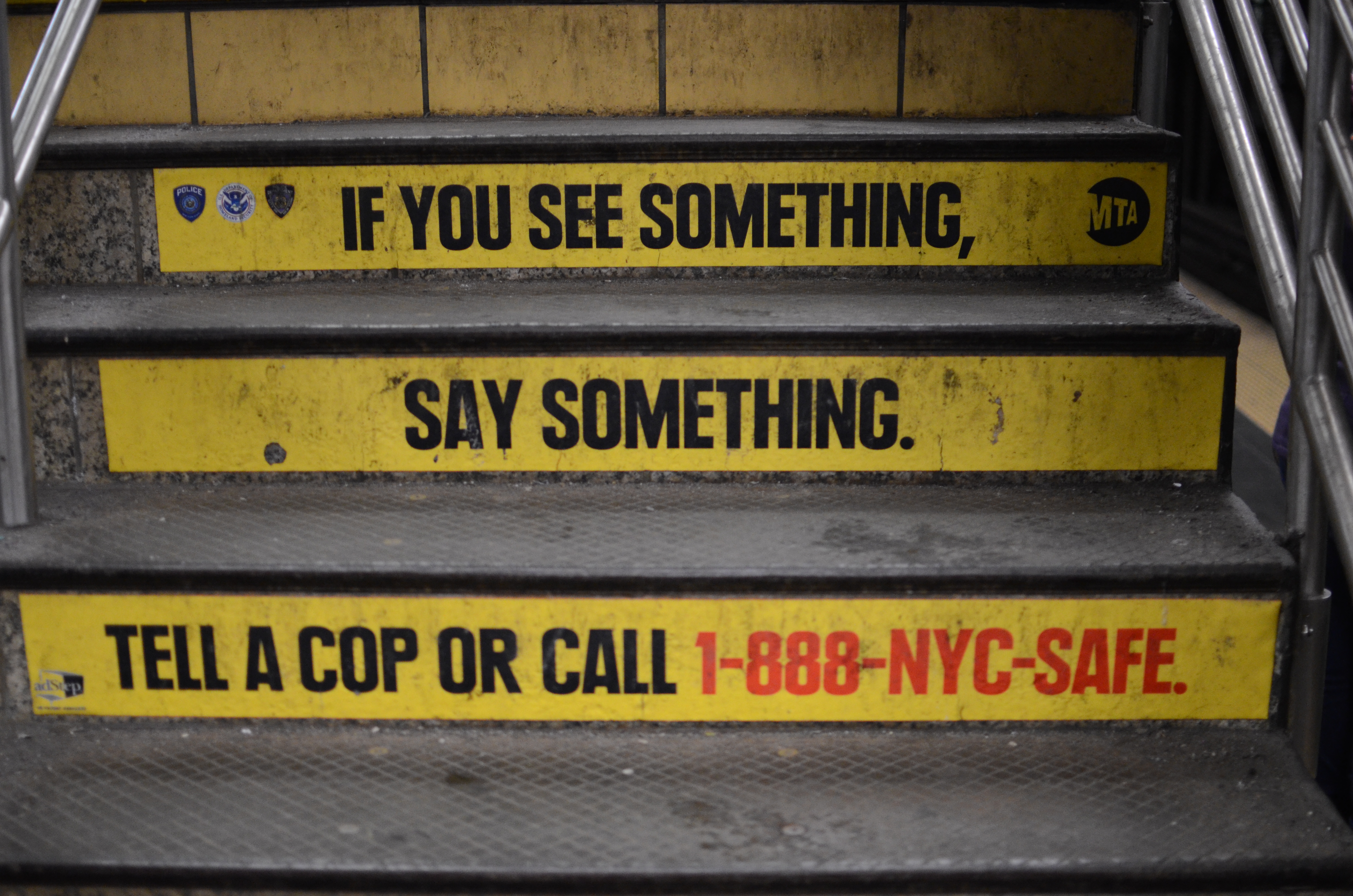 If you see something, say something, een anti-terrorismecampagne van de Amerikaanse overheid.